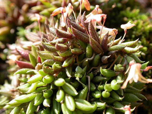 Photos by Dalton Holland Baptista and Americo Docha Neto for Orchidstudium